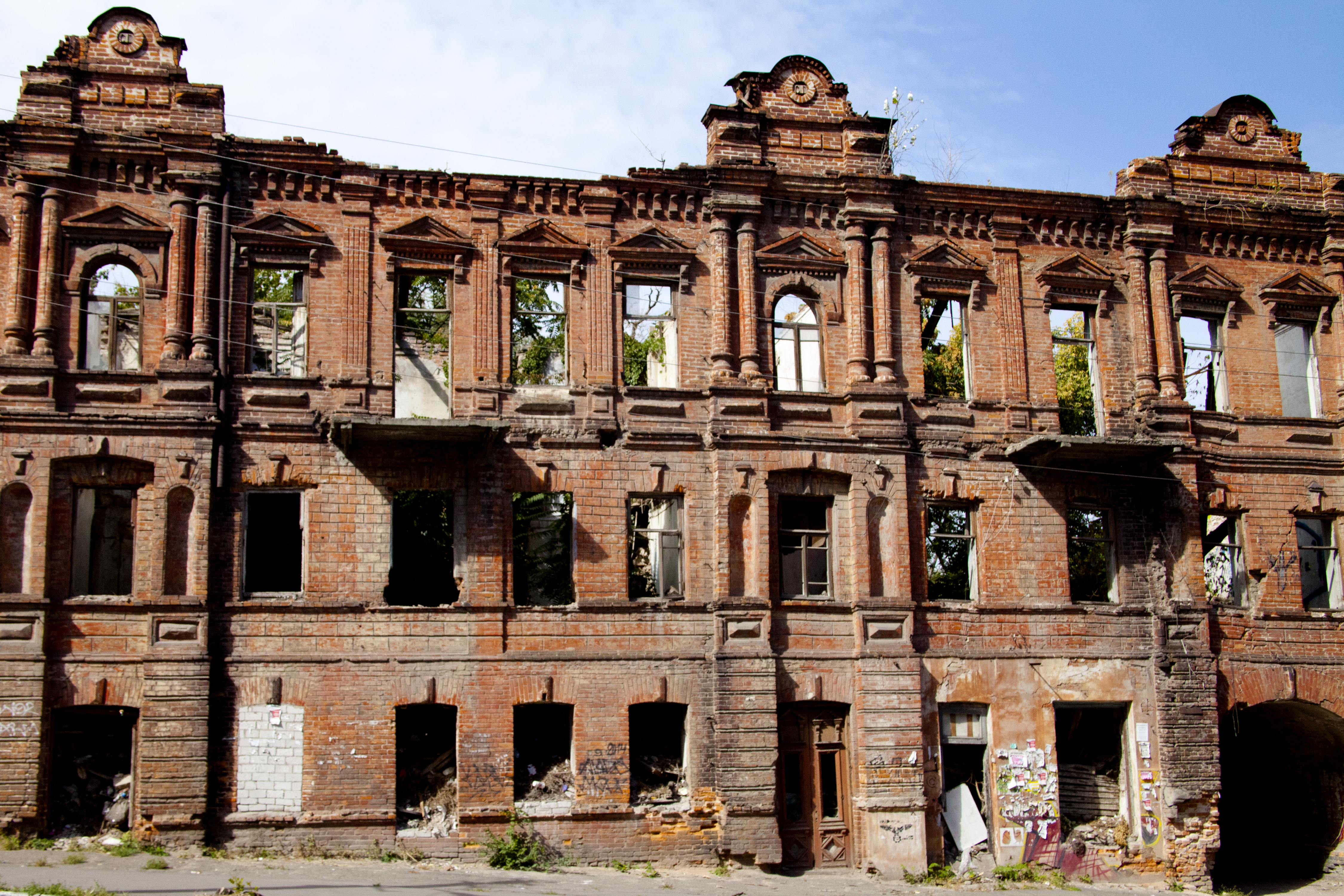 Доходний будинок, Дніпропетровськ, Артема вул., 26